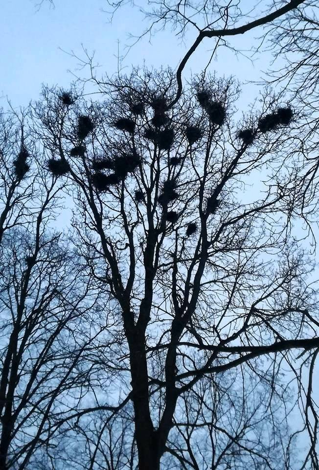 Künnivareste pesade koloonia Tartu kesklinnas.